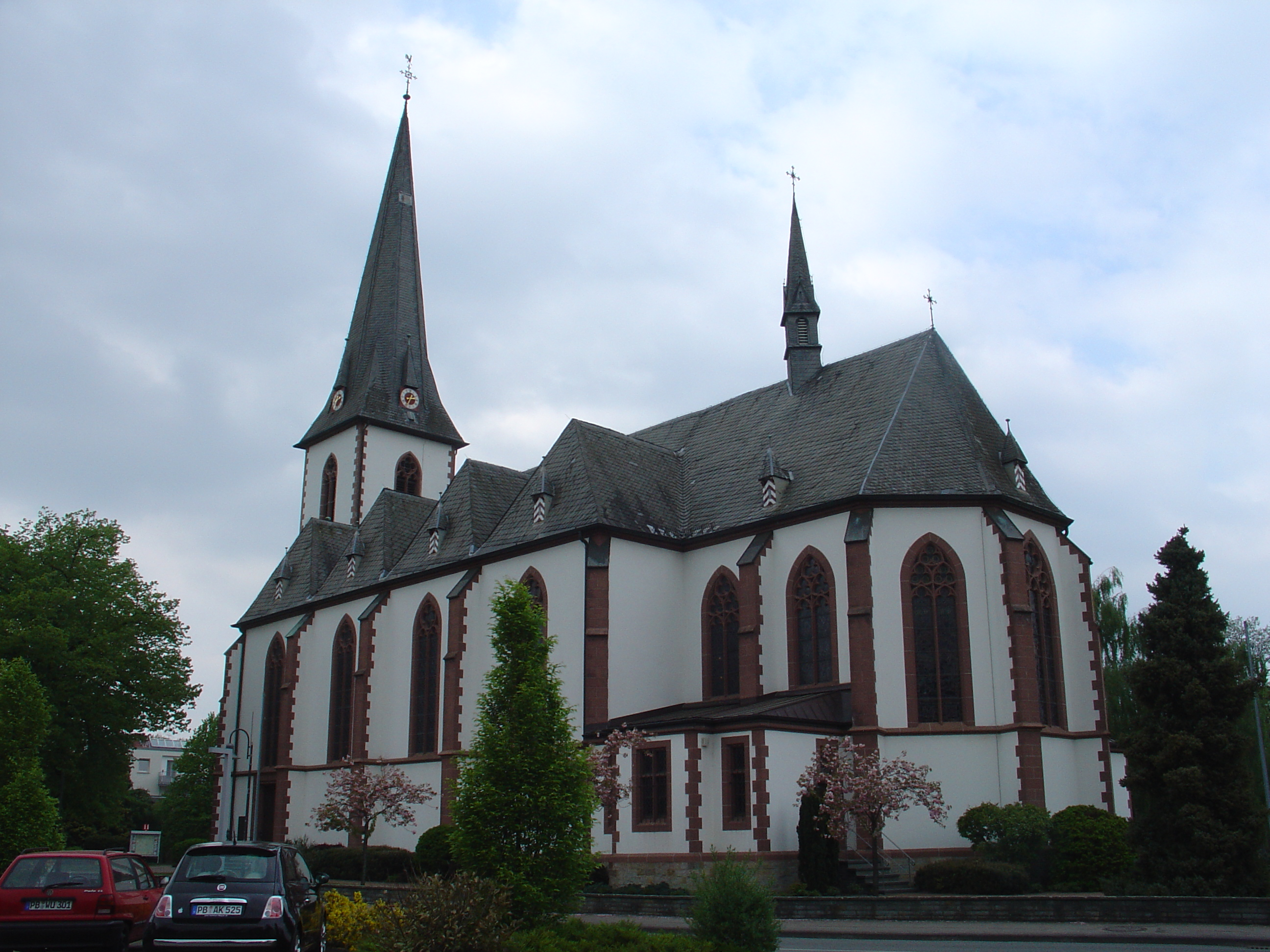 Seitenansicht von St. Joseph in Delbrück-Westenholz